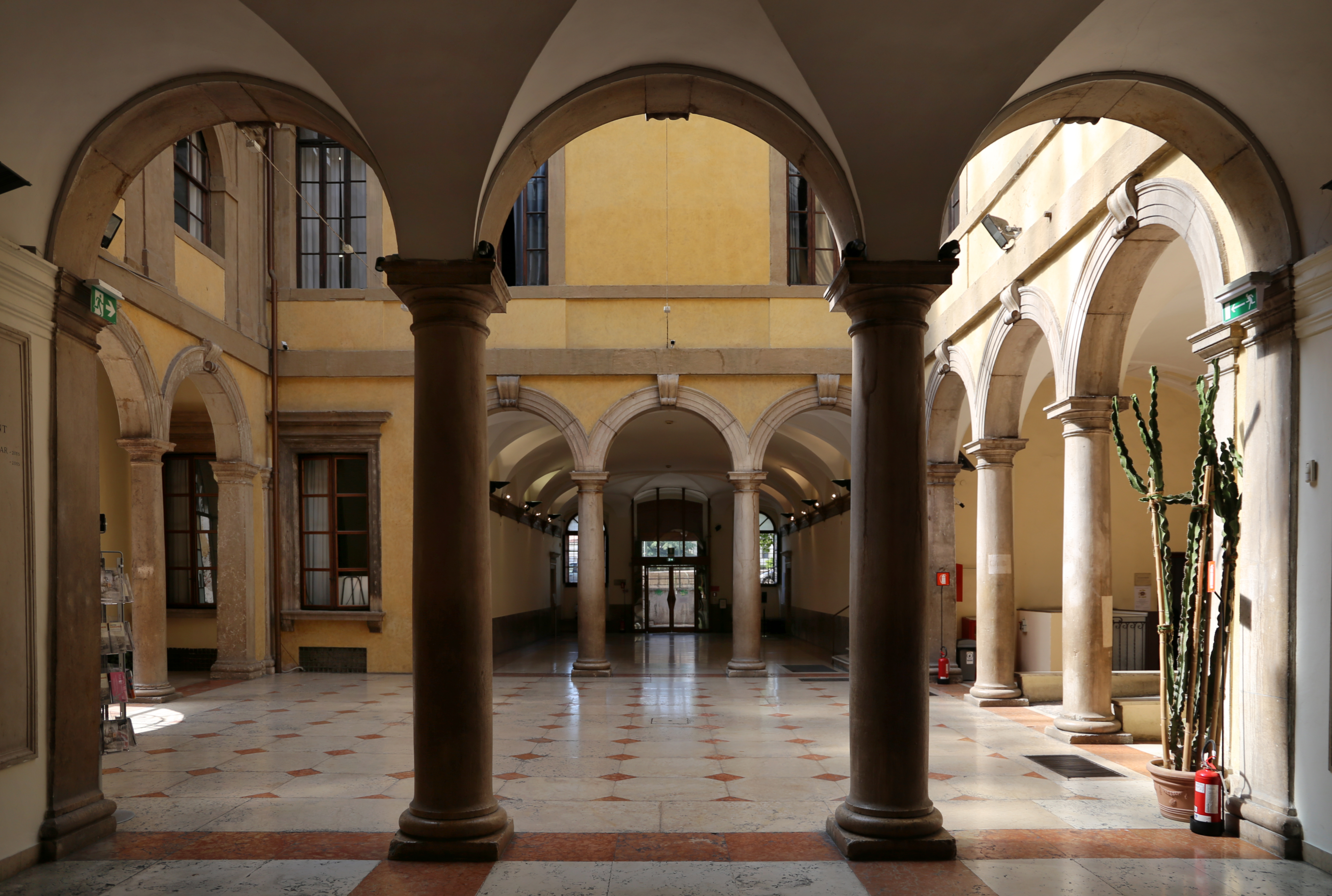 Palazzo Pompei This is a photo of a monument which is part of cultural heritage of Italy.